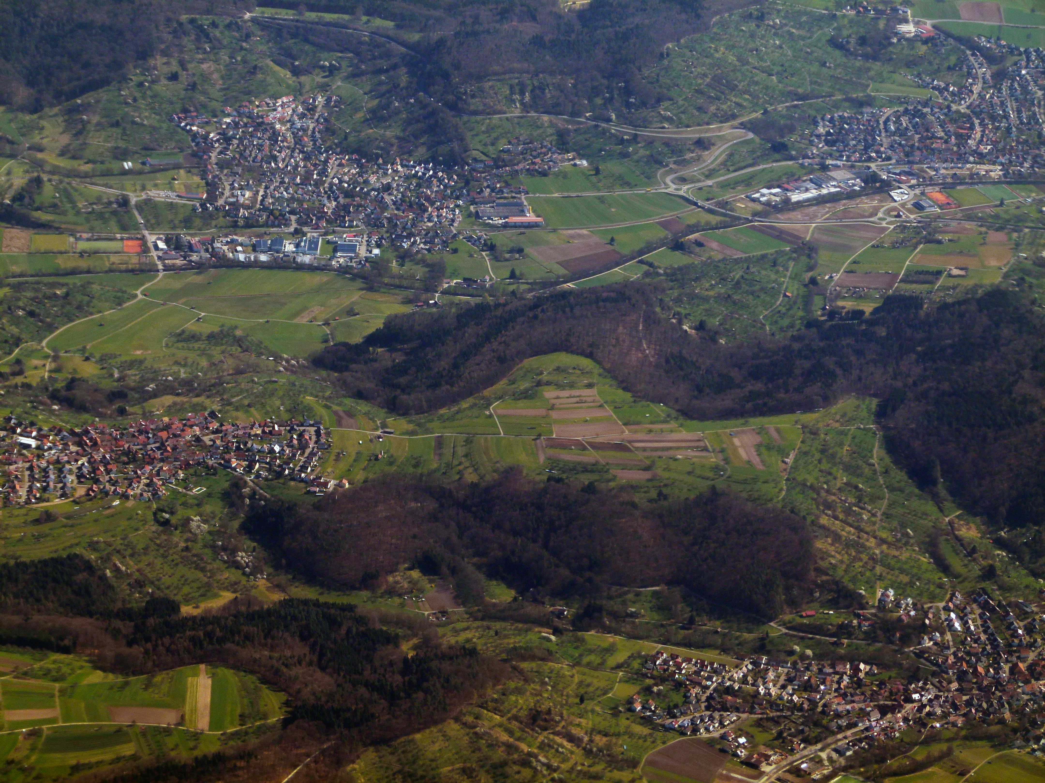 Buhlbronn (links unten), Miedelsbach (links oben), Haubersbronn (rechts oben) und Schornbach (rechts unten) - Stadtteile von Schorndorf